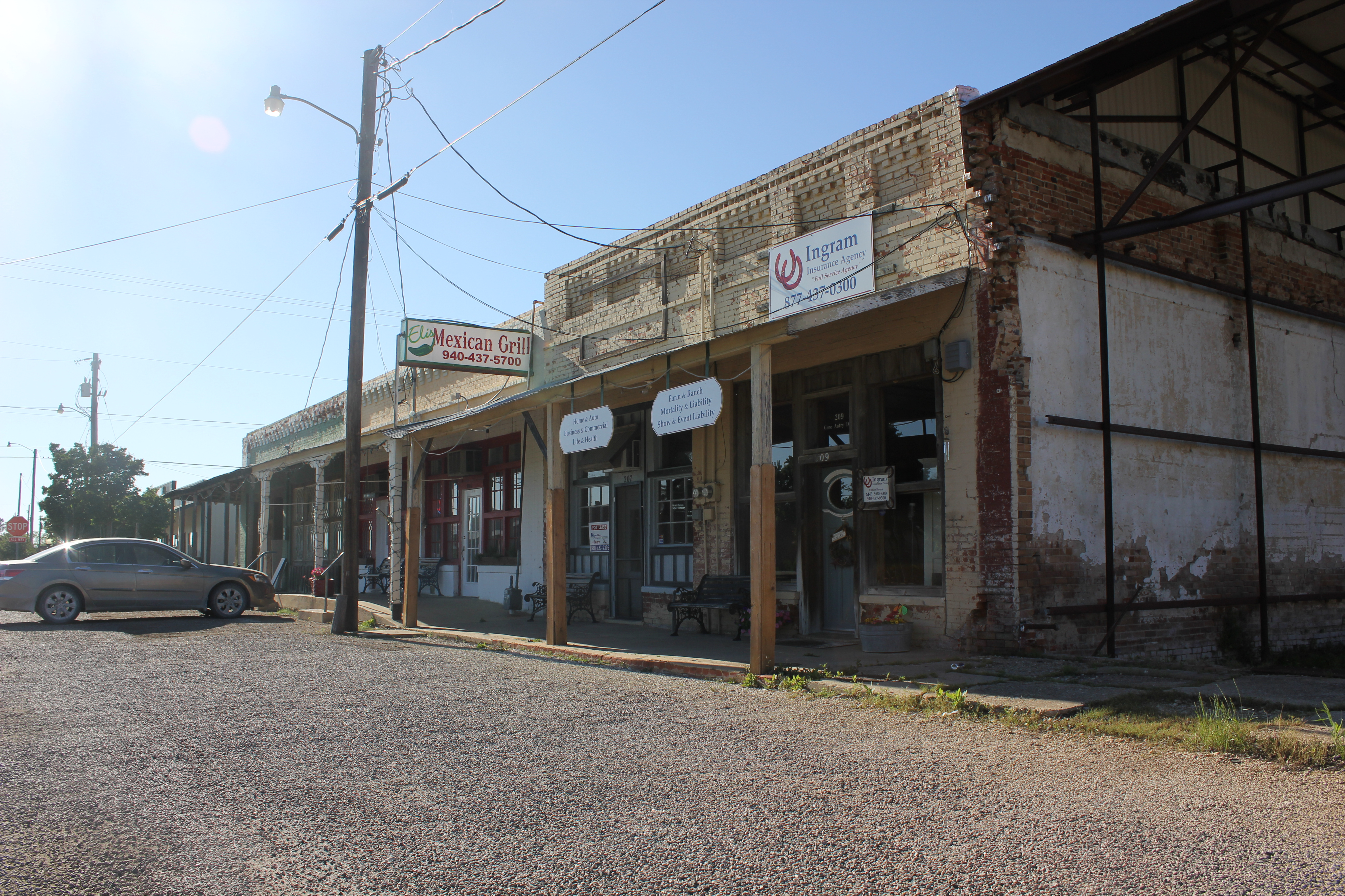 Tioga, Texas